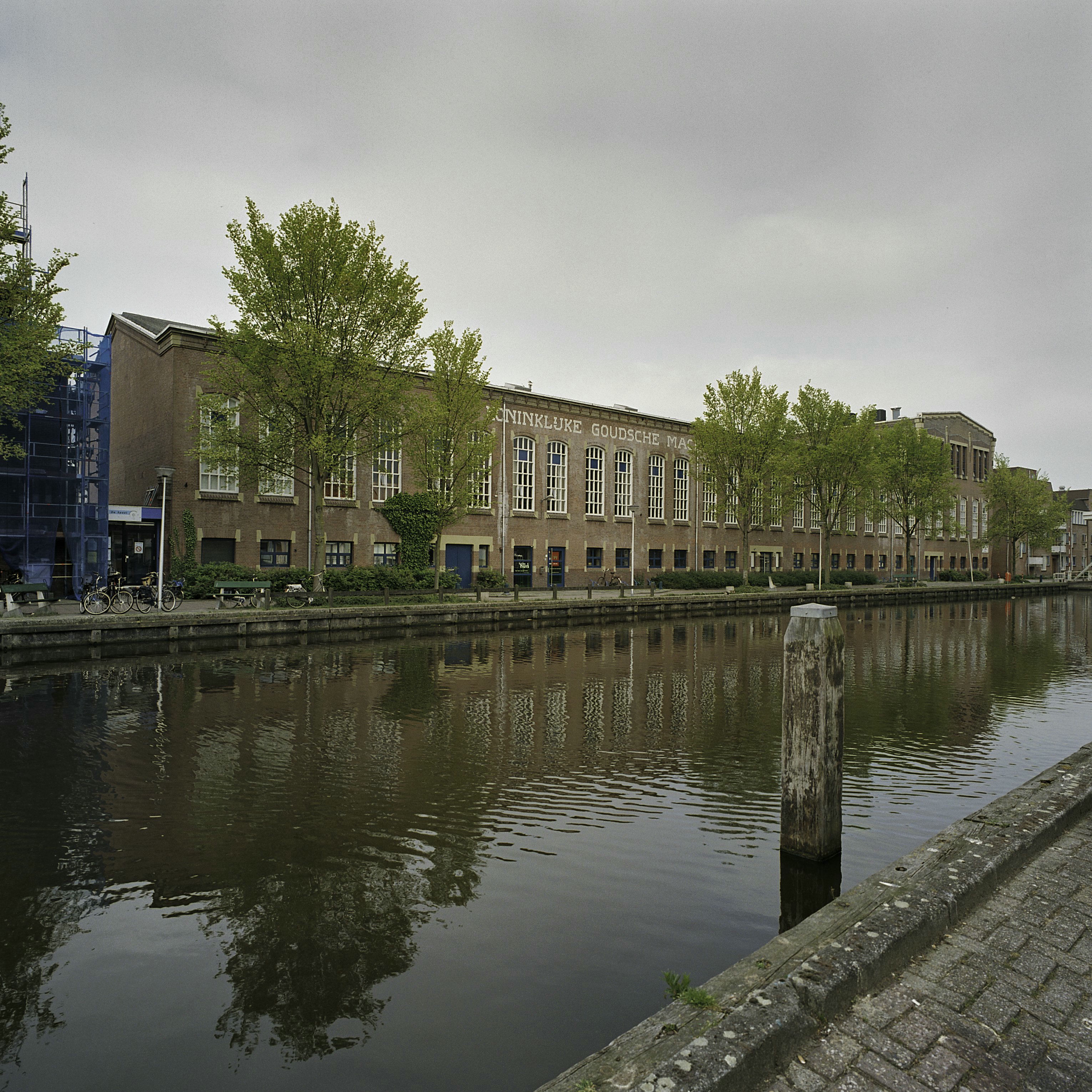 Koninklijke Goudsche Machinale Garenspinnerij: Overzicht garenspinnerij vanaf overkant gracht (opmerking: Gefotografeerd voor Monumenten In Nederland Zuid-Holland)